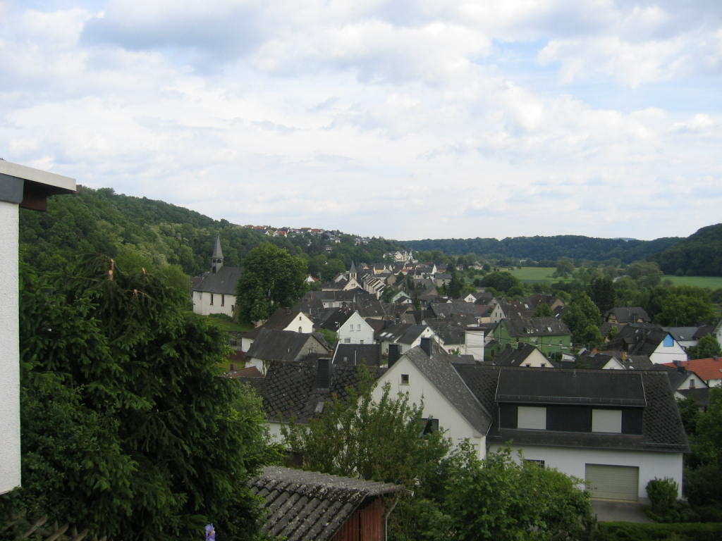 Runkel-Steeden Unterdorf